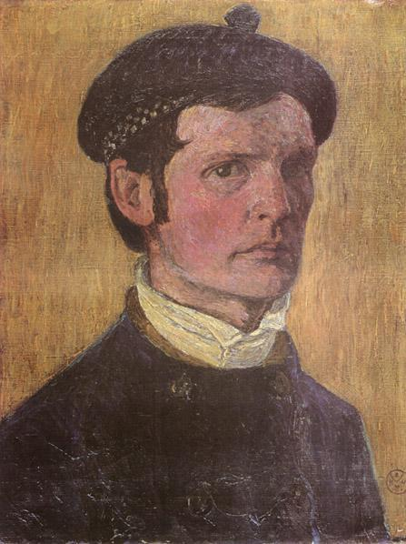 Selbstbildnis mit Schottenkappe; Öl auf Leinwand; 42,5 x 33 cm (Museum am Modersohn-Haus, Worpswede; 2002 gestohlen)